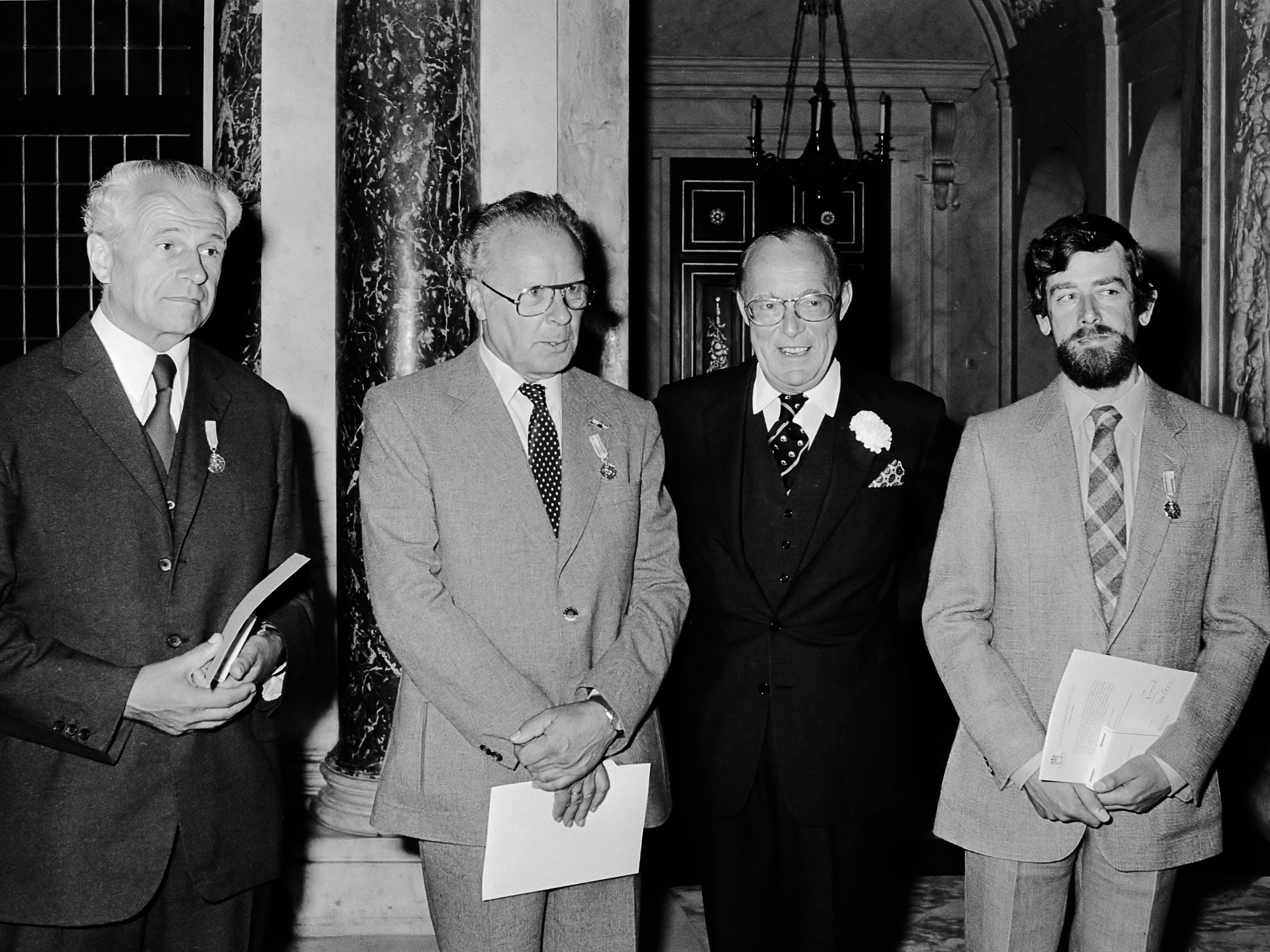 Prins Bernhard reikt Zilveren Anjers uit in het Paleis op de Dam. Prins Bernhard met de decorati ds. W.G. Overbosch, J.J. Schilstra en W. Kramer 26 juni 1979